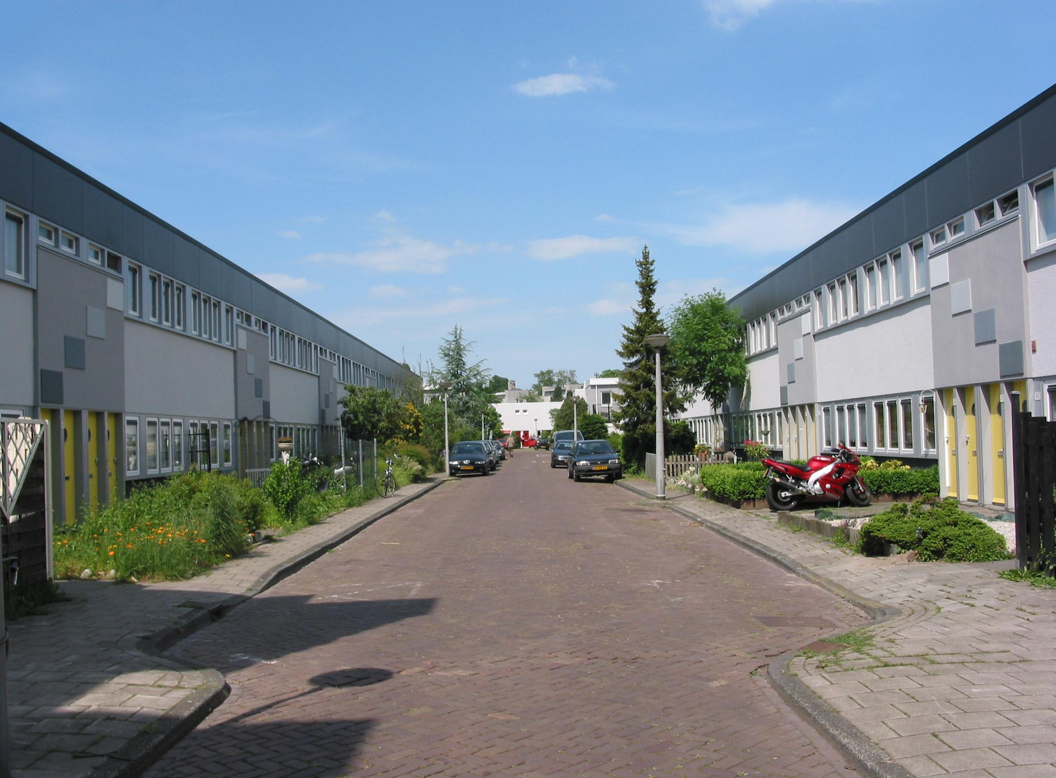 Schovenstraat, gezien in de richting van de Oogststraat, Betondorp, Amsterdam, met huizen van Han van Loghem.